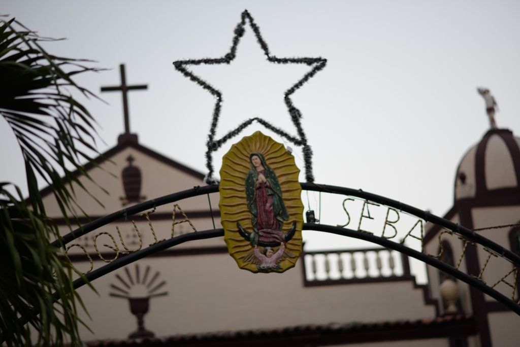 La Iglesia de Paroquia Sebastian, Achuapa, Nicaragua